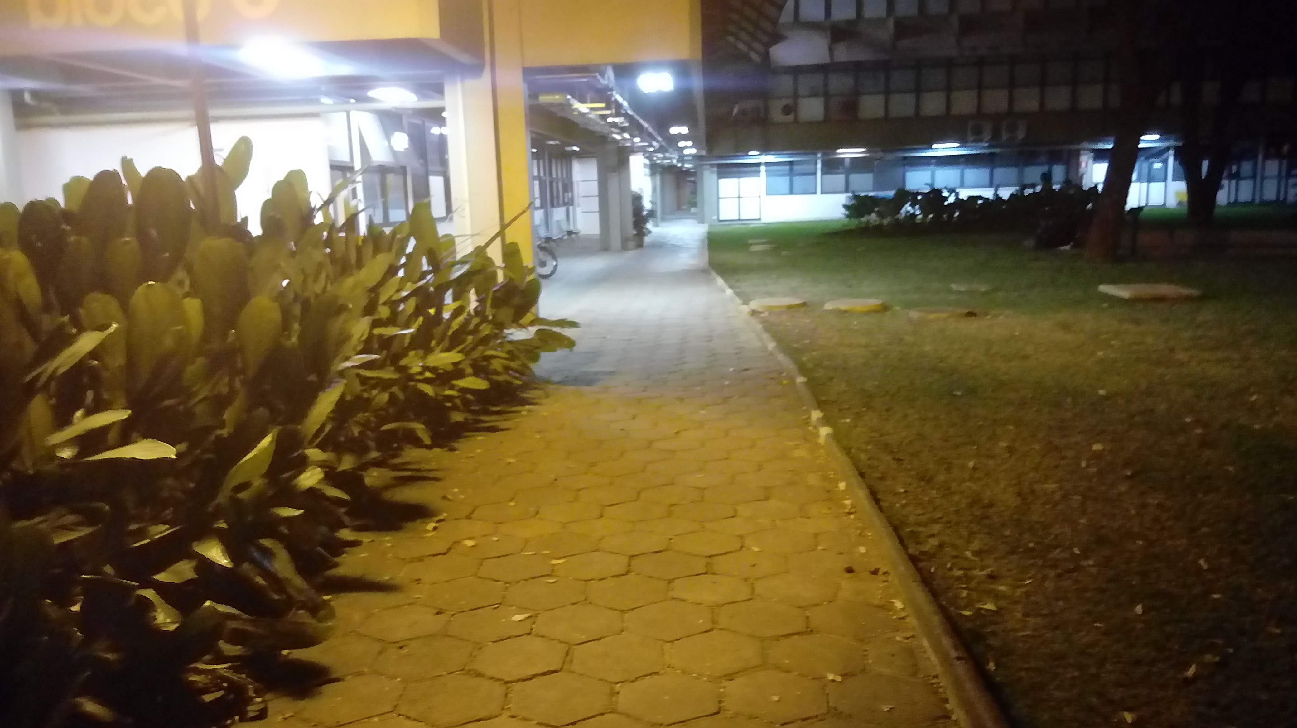 instituto de Ciências biológicas da UFMG Foto : Anderson Almeida